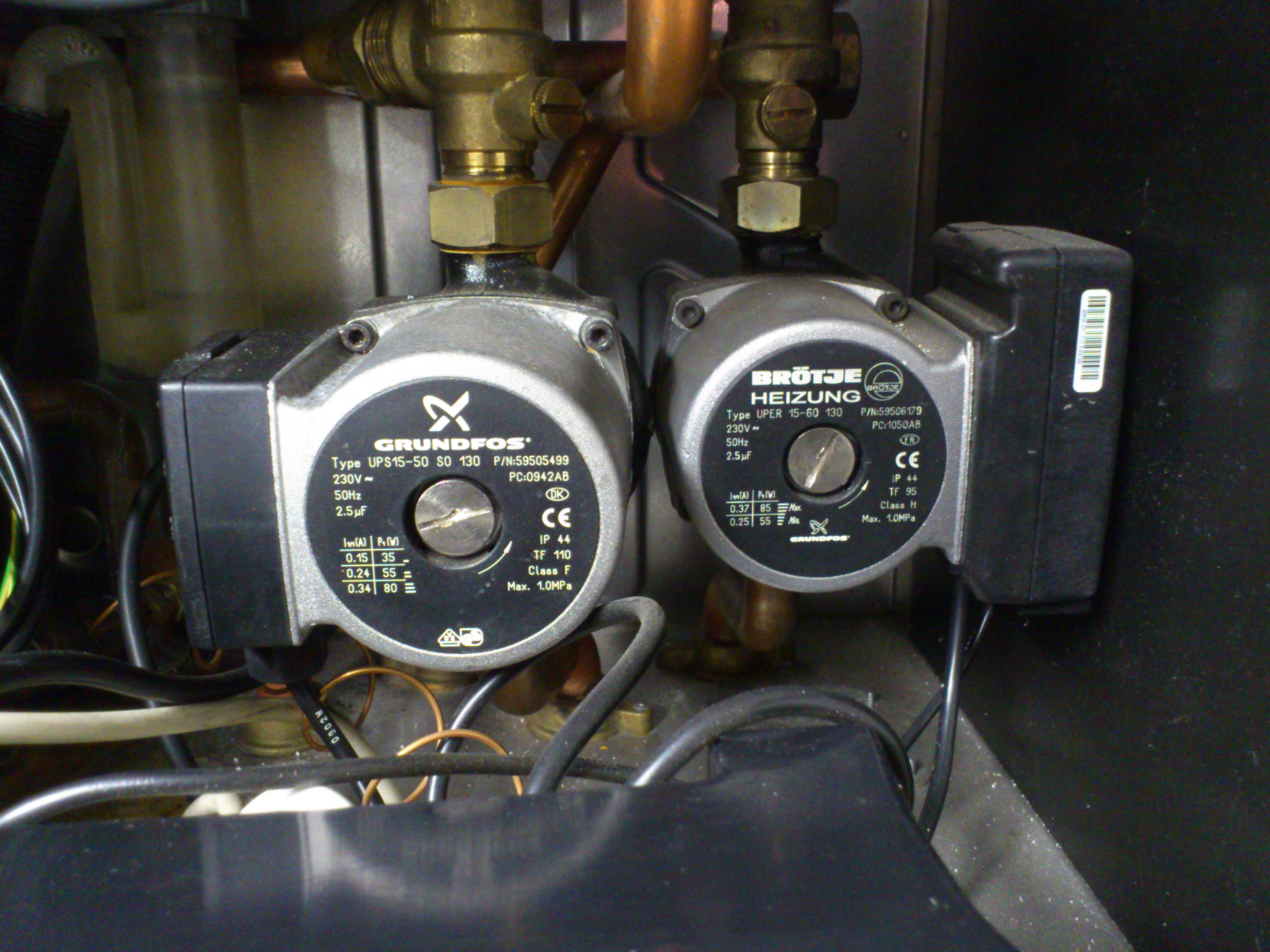 Circulateurs Grundfos dans une chaudière à gaz Brötje EcoTherm Plus WGB 28 C. À gauche : 3 vitesses. À droite : vitesse variable en continu.